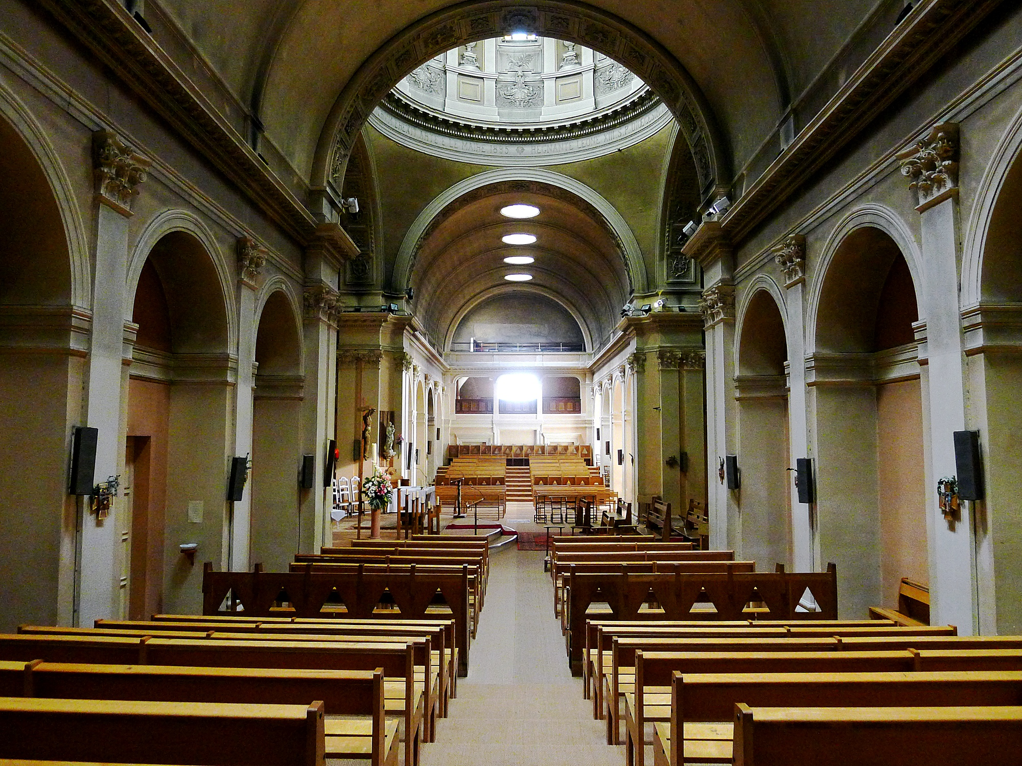 Église Notre-Dame-de-l'Assomption-de-Passy (nef) - Paris XVI